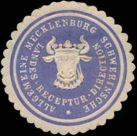 Sealing stamp Title: Allgemeine Mecklenburg Schwerinsche Landes Receptur-Direction Description: Apotheke, blau, weiß, geprägt Place: Schwerin size: 4 cm